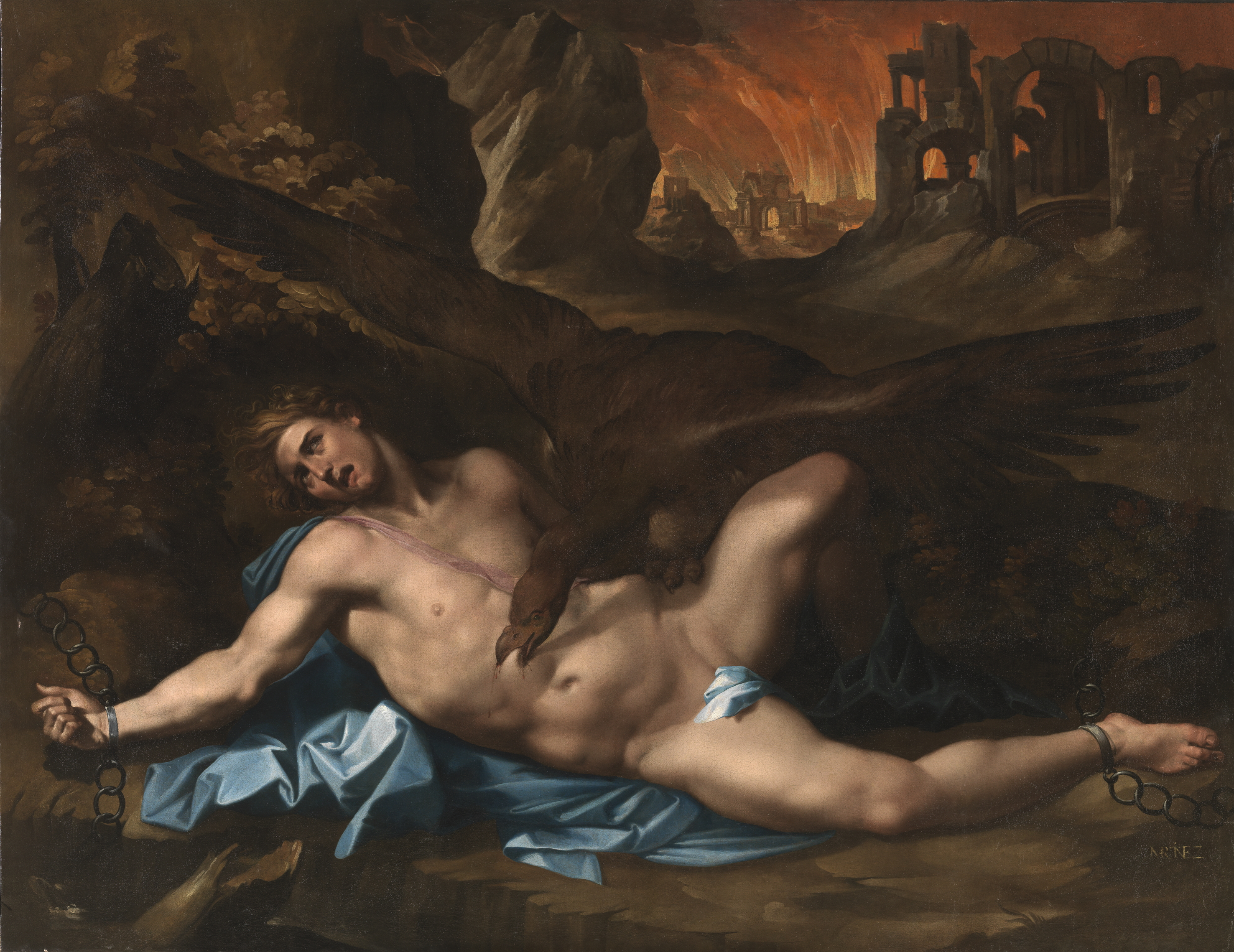 La obra representa a Ticio encadenado y a un buitre devorándole las entrañas como eterno castigo.